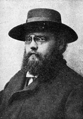 Antonín Macek, spisovatel (1872-1923)